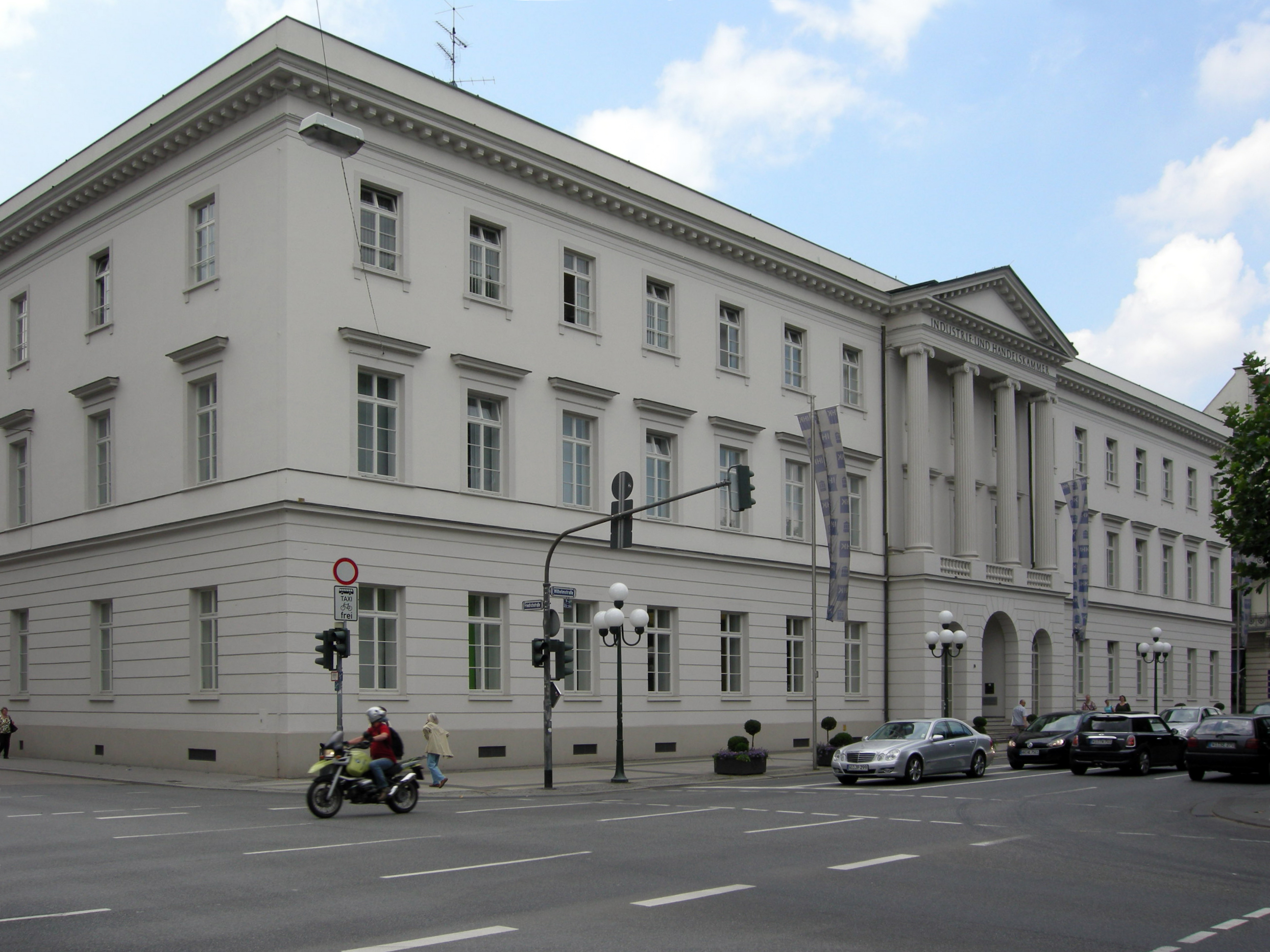 Erbprinzenpalais Wilhelmstraße Wiesbaden. Erbaut von Christian Zais in den Jahren 1813 bis 1817. Sitz der Industrie- und Handelskammer Wiesbaden.